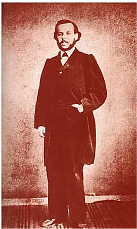 Augusto Ferran y Fornies